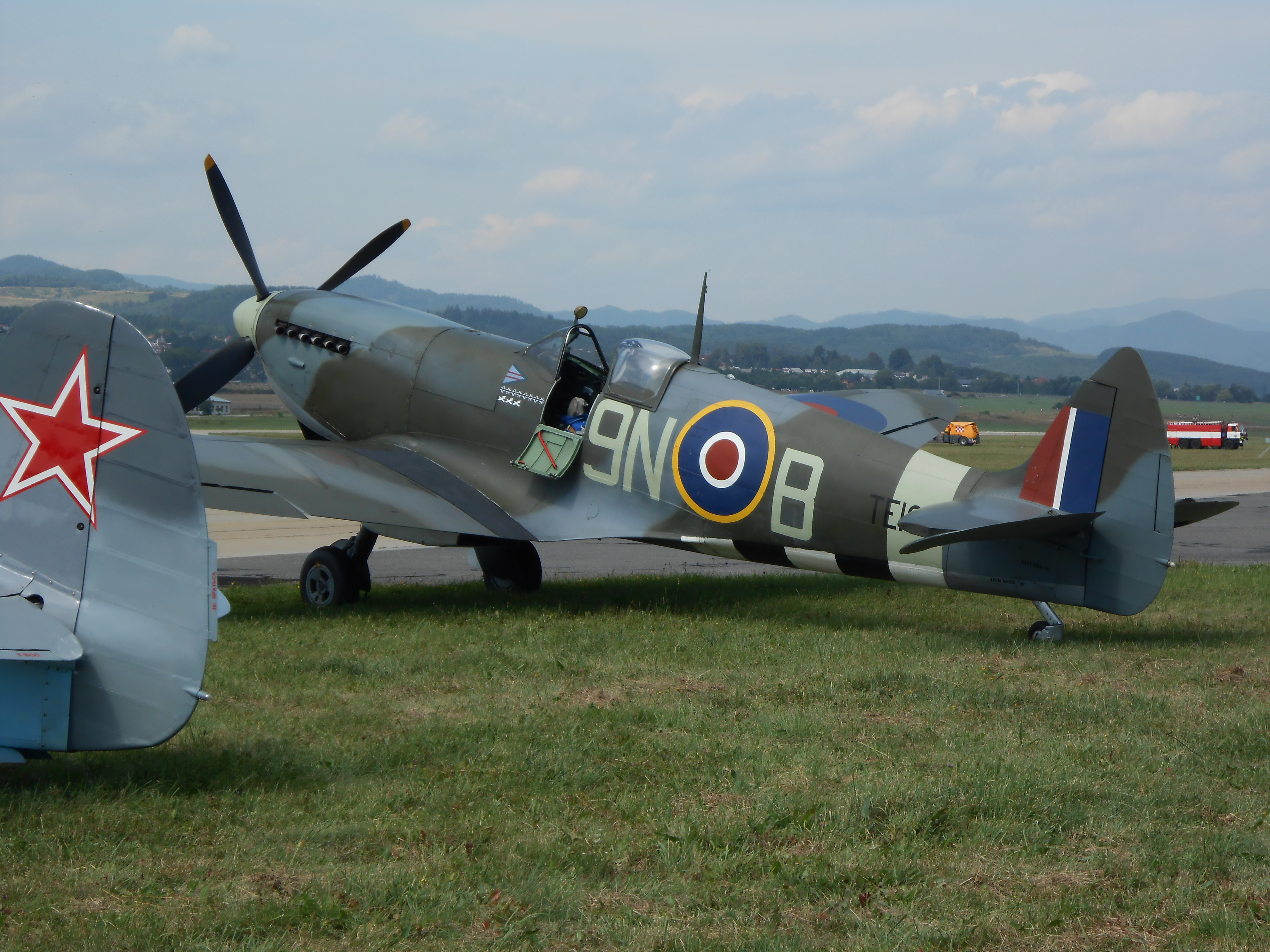 Supermarine Spitfire Mk.XVIE (G-MXVI) na SIAF-e 2017